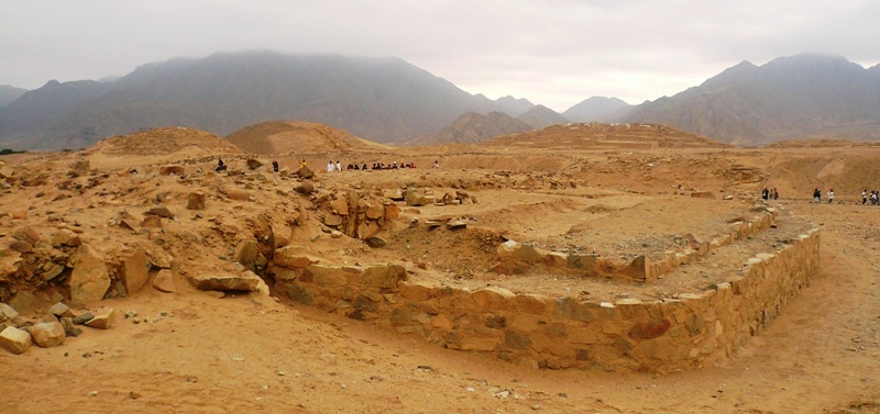 Una estructura arqueológica de Caral